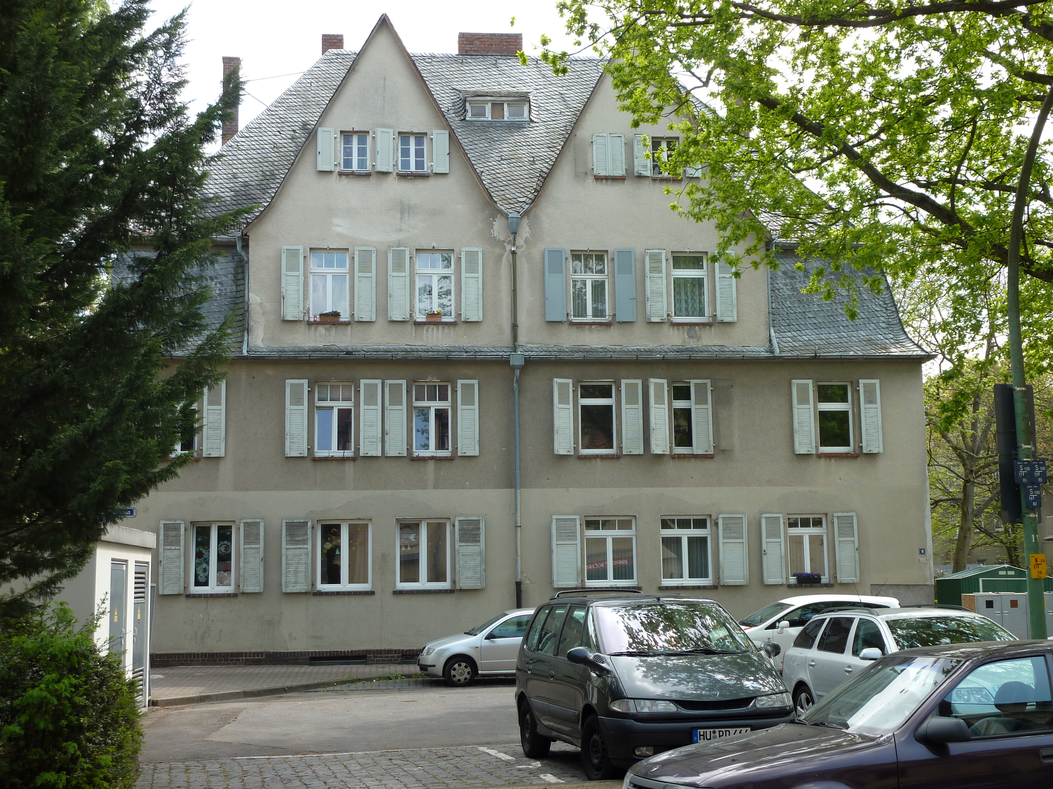 Wohnhaus der Frankfurter Sozialdemokratin und Reichstagsabgeordneten Johanna Tesch (1875–1945) im Frankfurter Stadtteil Riederwald.